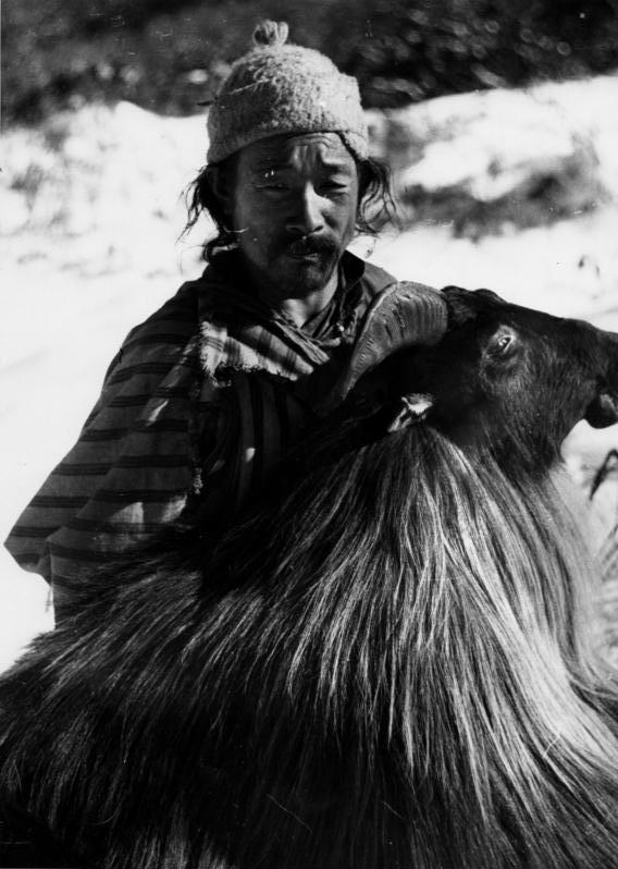 Erbeutete Schapis